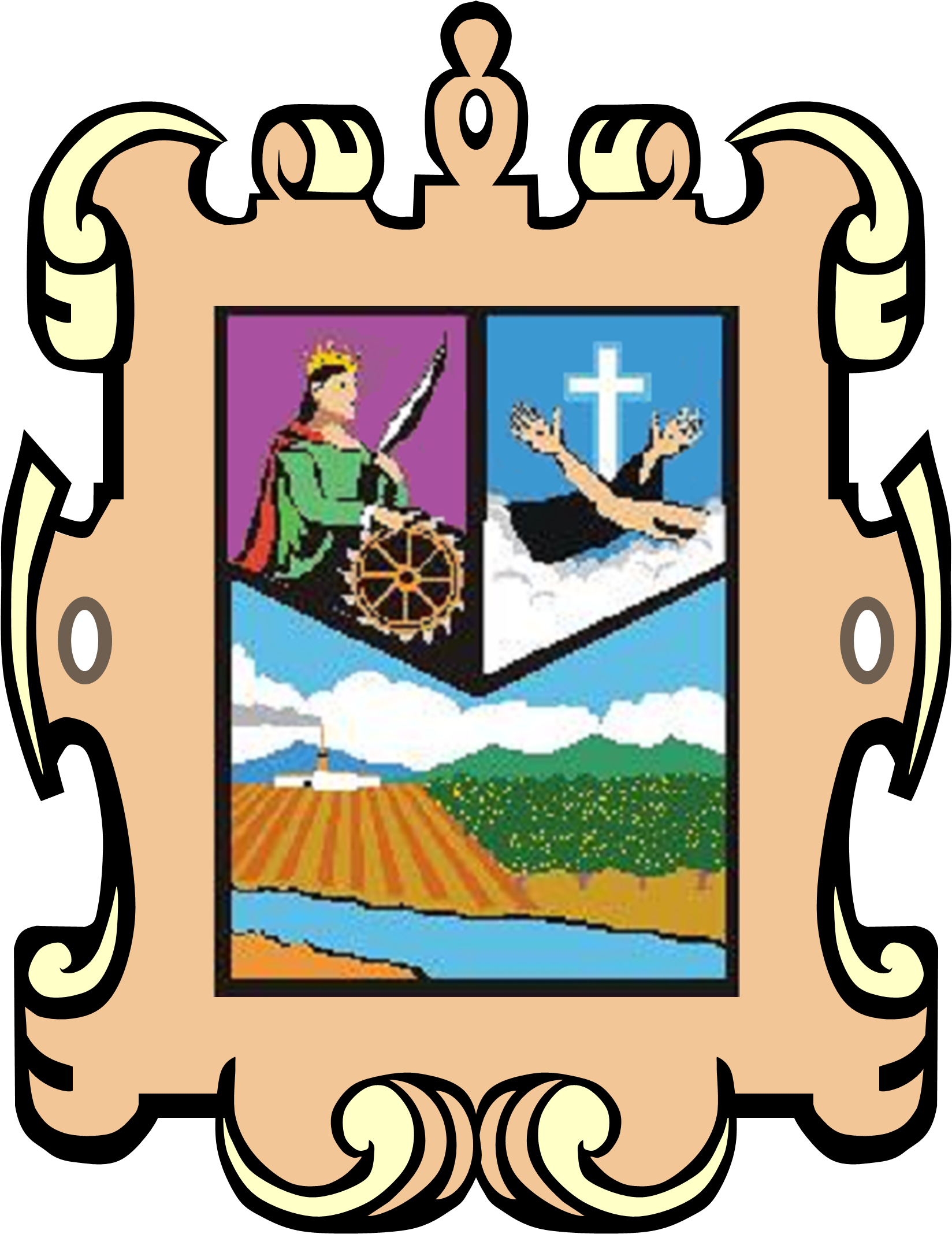 Escudo del municipio de Rioverde.